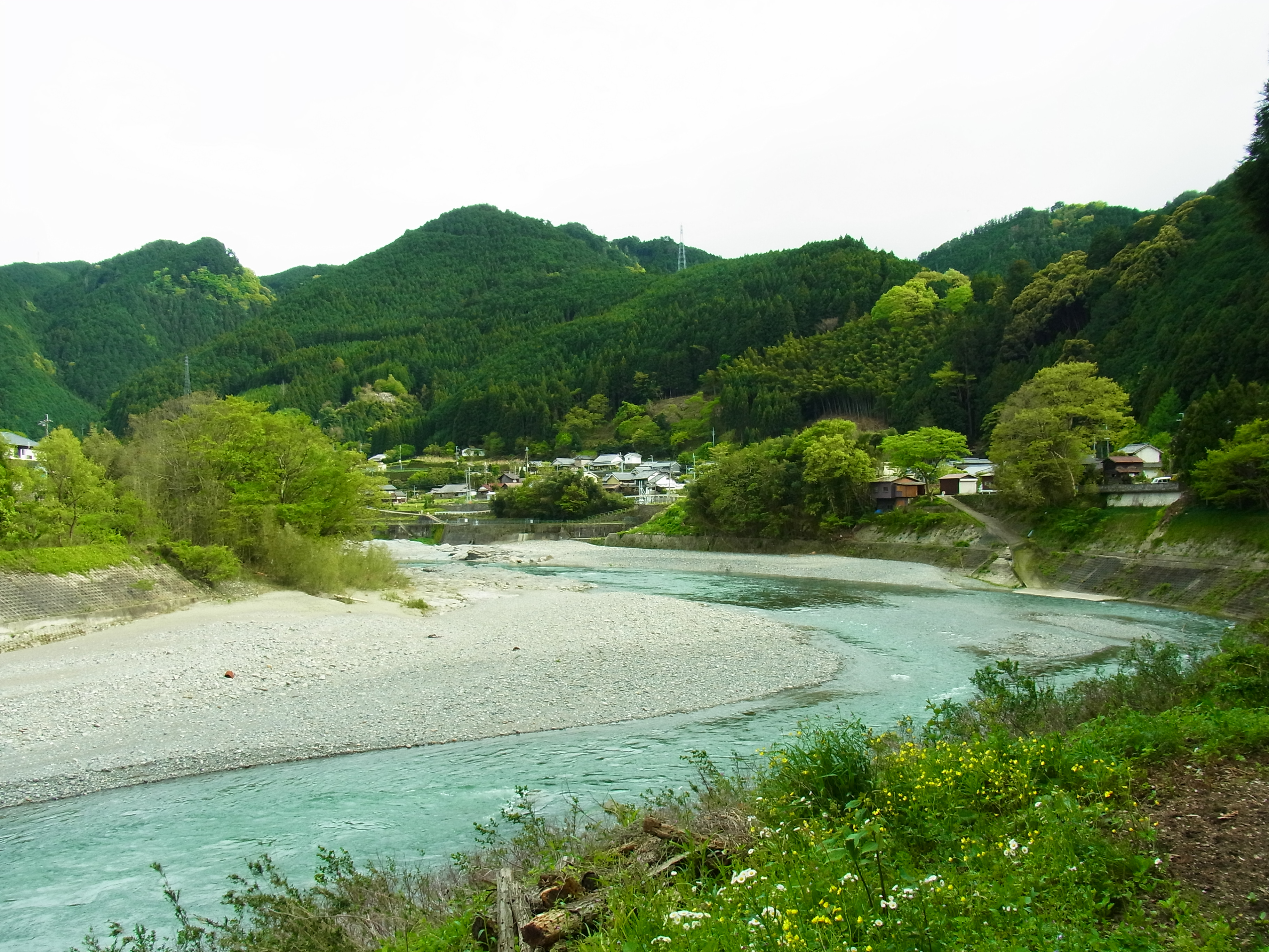 吉野川 吉野町樫尾にて Yoshinogawa in Kashio 2012.5.01